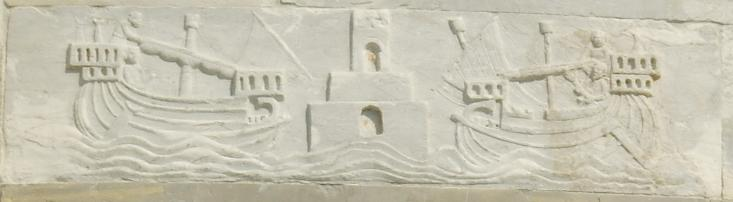 Torre_di_Pisa,_lastre_scolpite